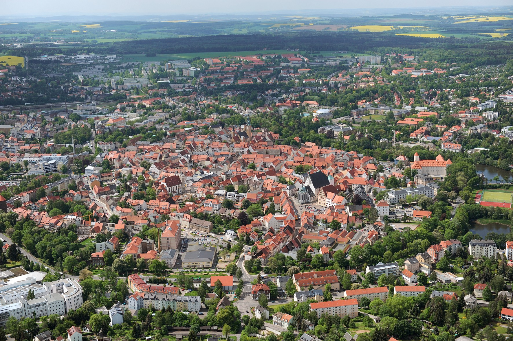 Blick auf die Altstadt Freibergs / Sachsen